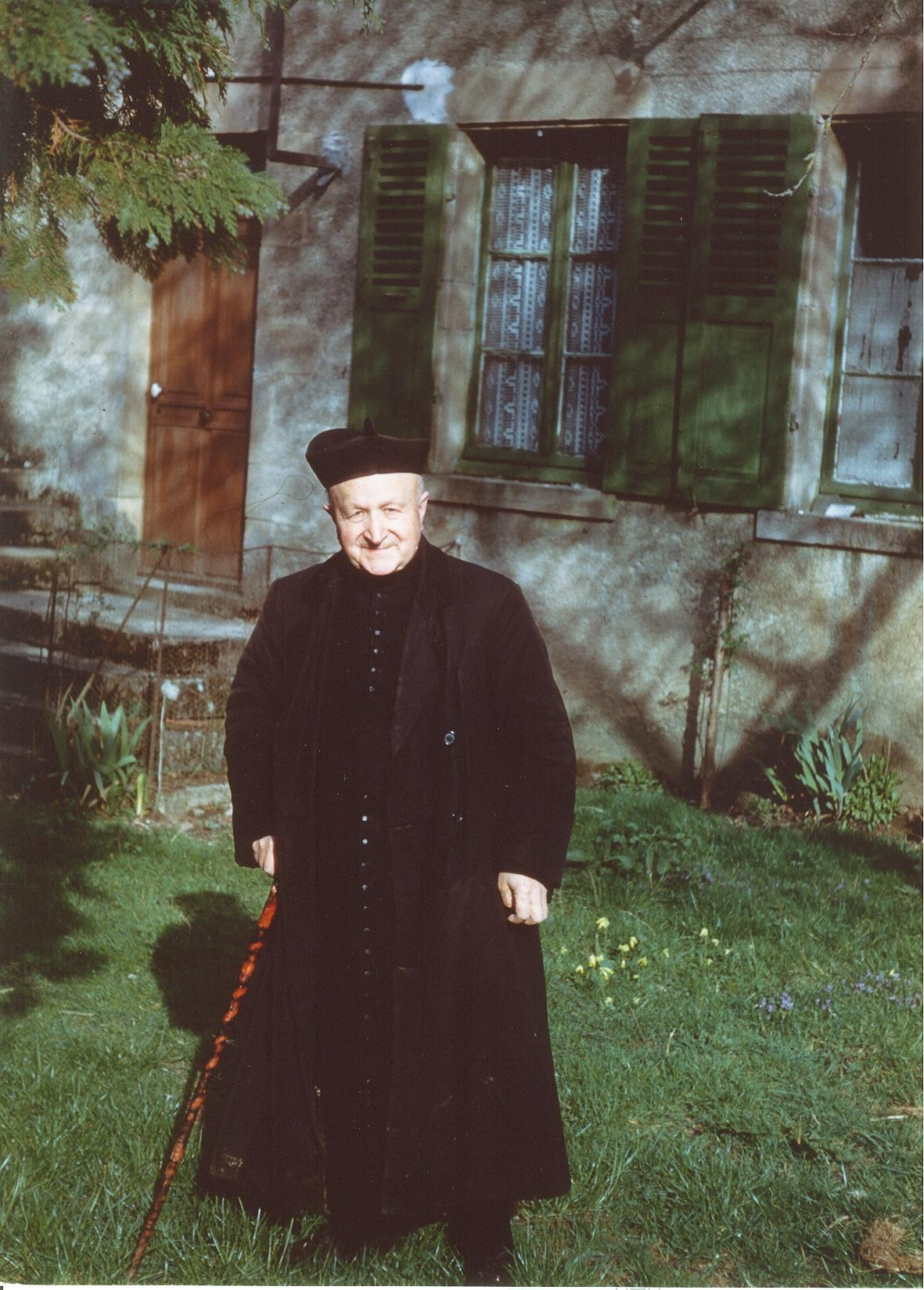 Photo de l'abbé Charrault prise dans son jardin, à Colméry (Nièvre), au printemps 1951. Lucien Charrault est l'auteur de plusieurs ouvrages d'histoire locale, dont une Histoire de Châteauneuf-Val-de-Bargis.